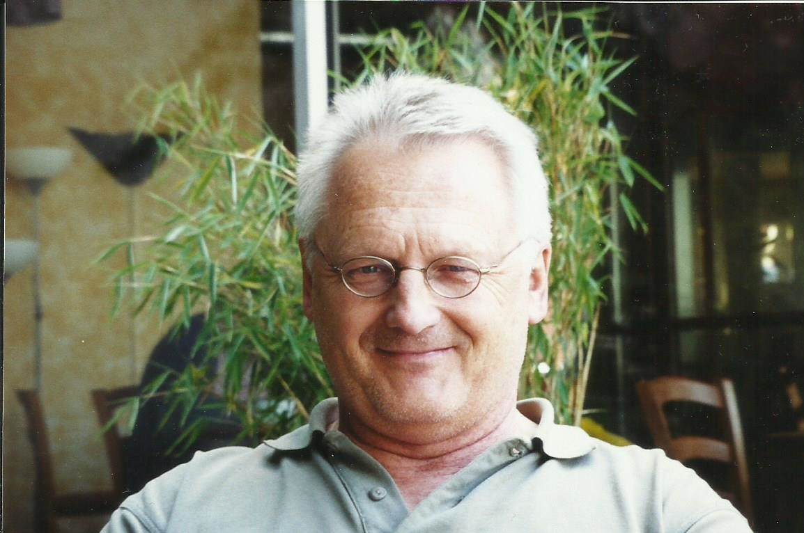 Im Jahre 2012